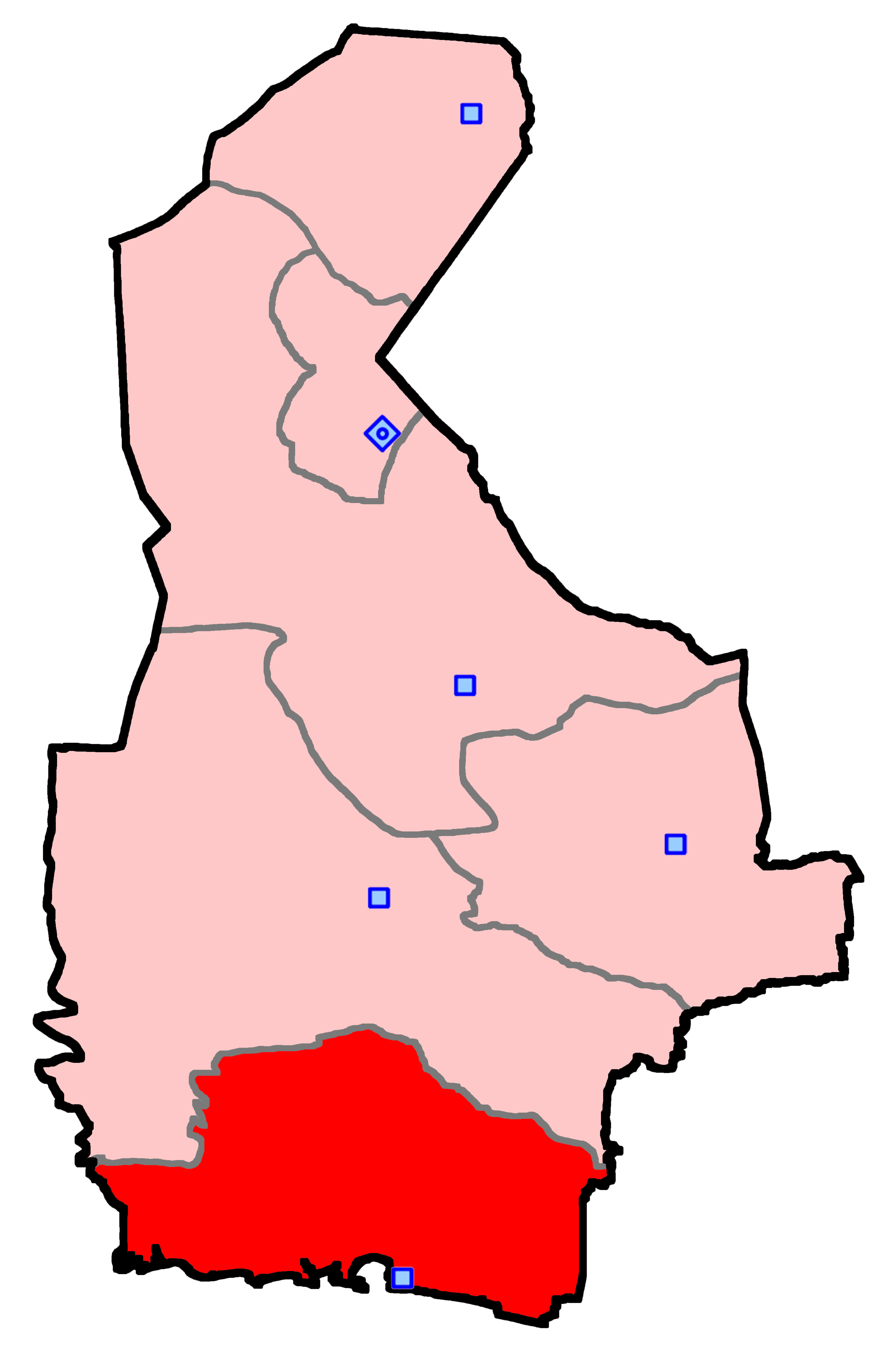 حوزه‌ چابهار برای انتخابات مجلس شورای اسلامی